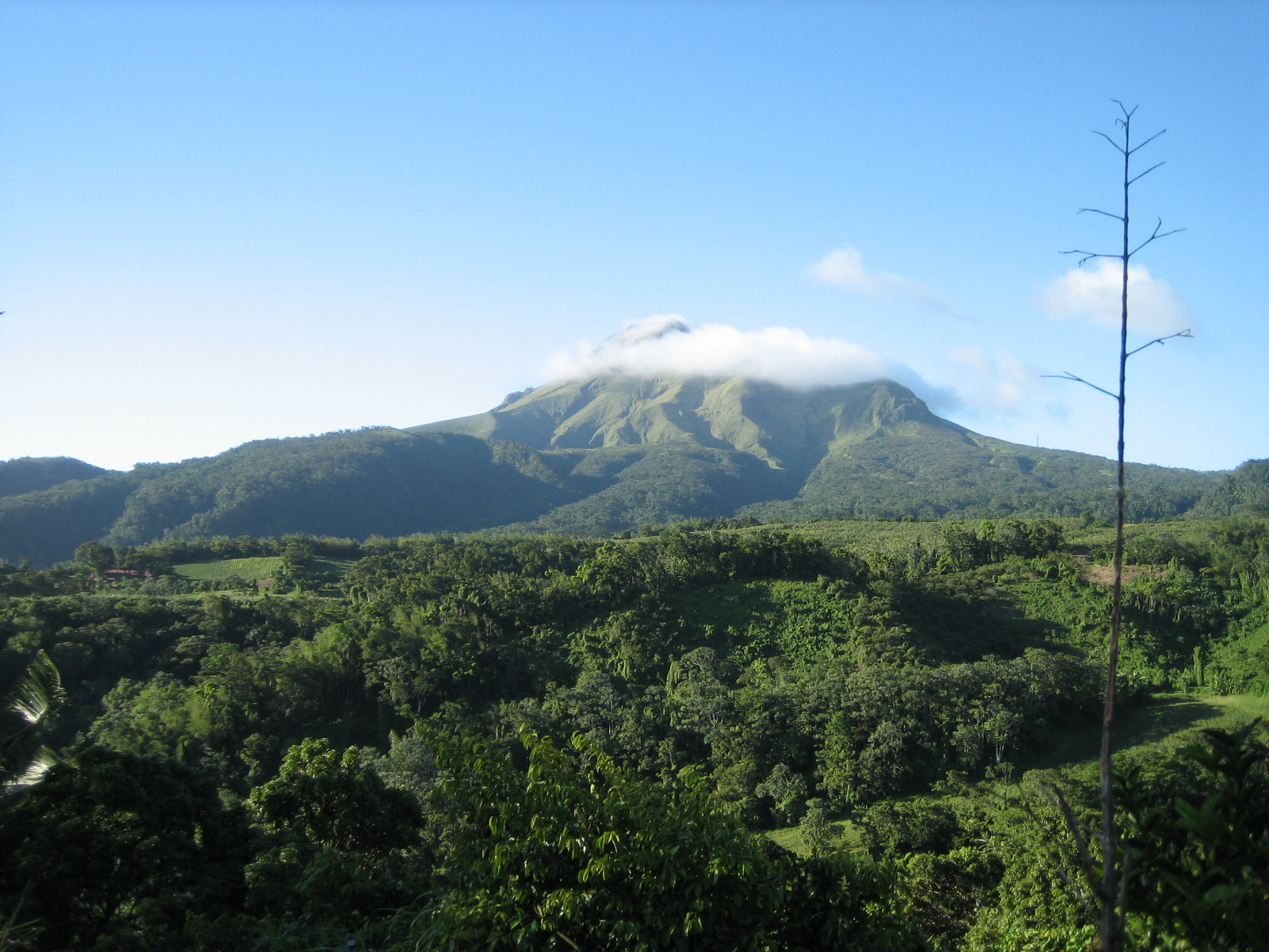 Sujet: : D'Montagne Pelée op Martinique, Dezember 2008.